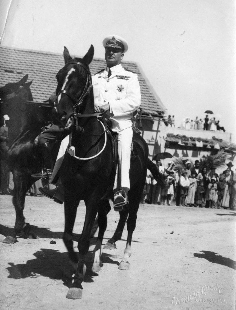 האדמירל ווב, צילום מקרוב של ווב על הסוס בעת המצעד ביפו.